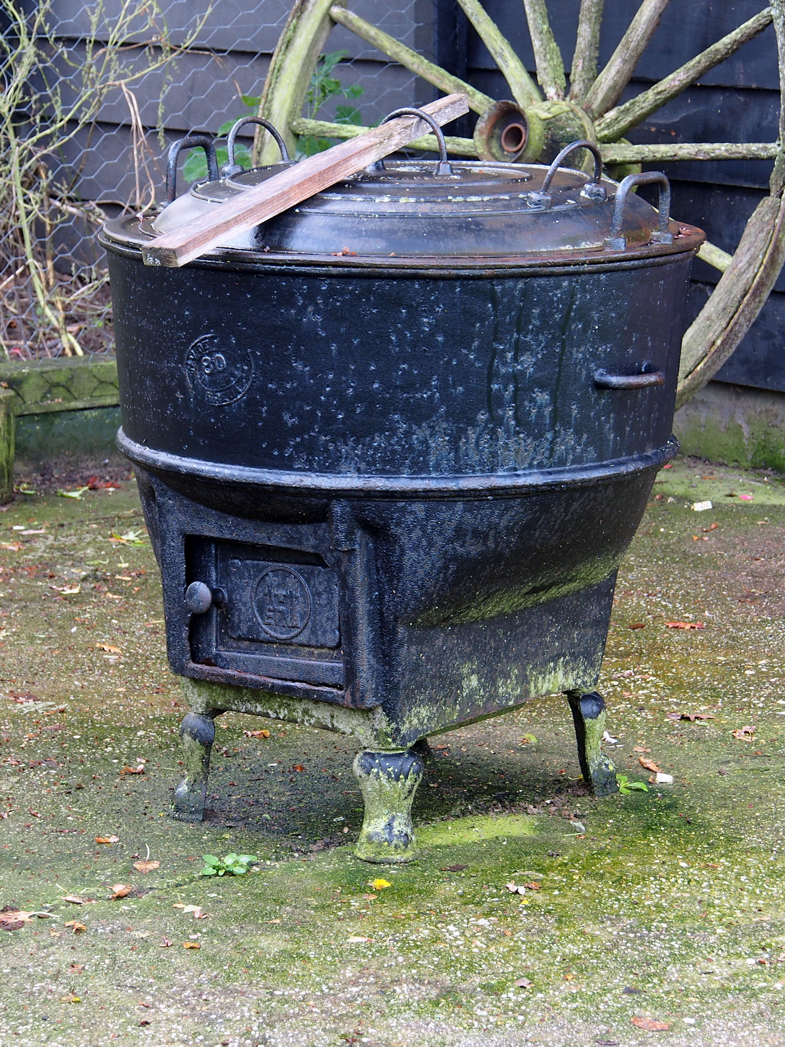 ETNA wasketel.